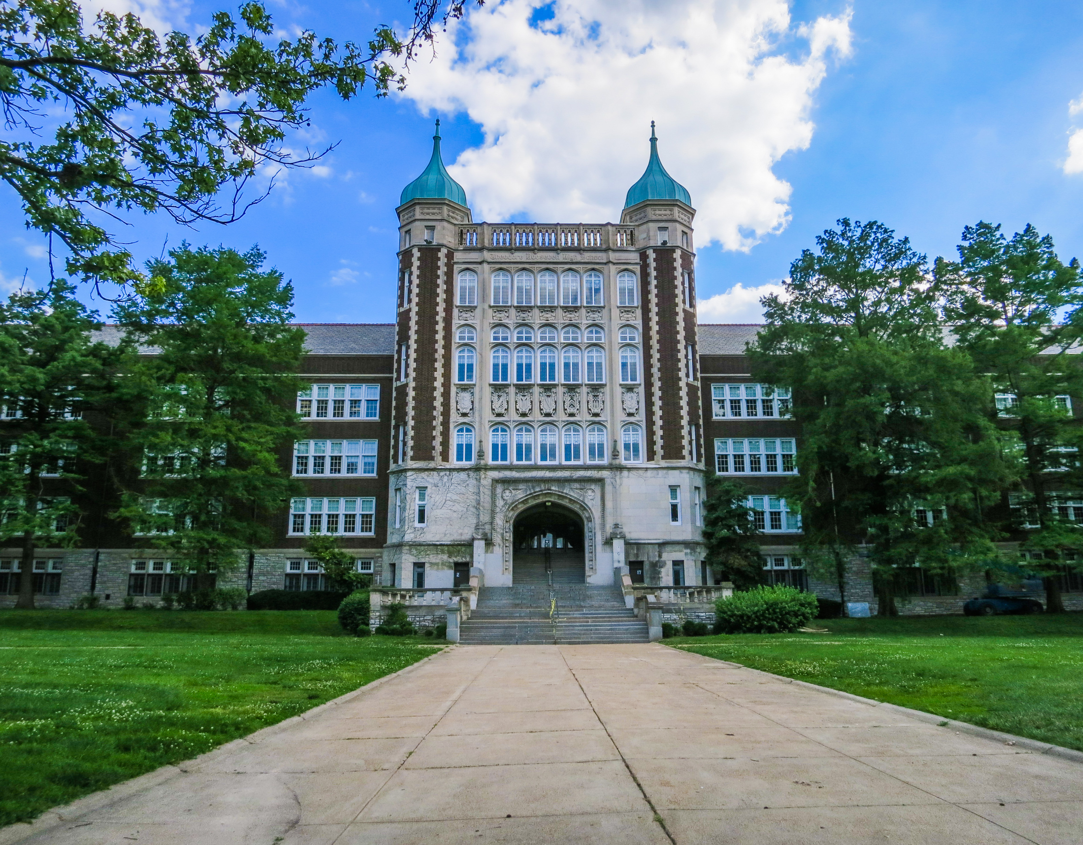 Roosevelt High